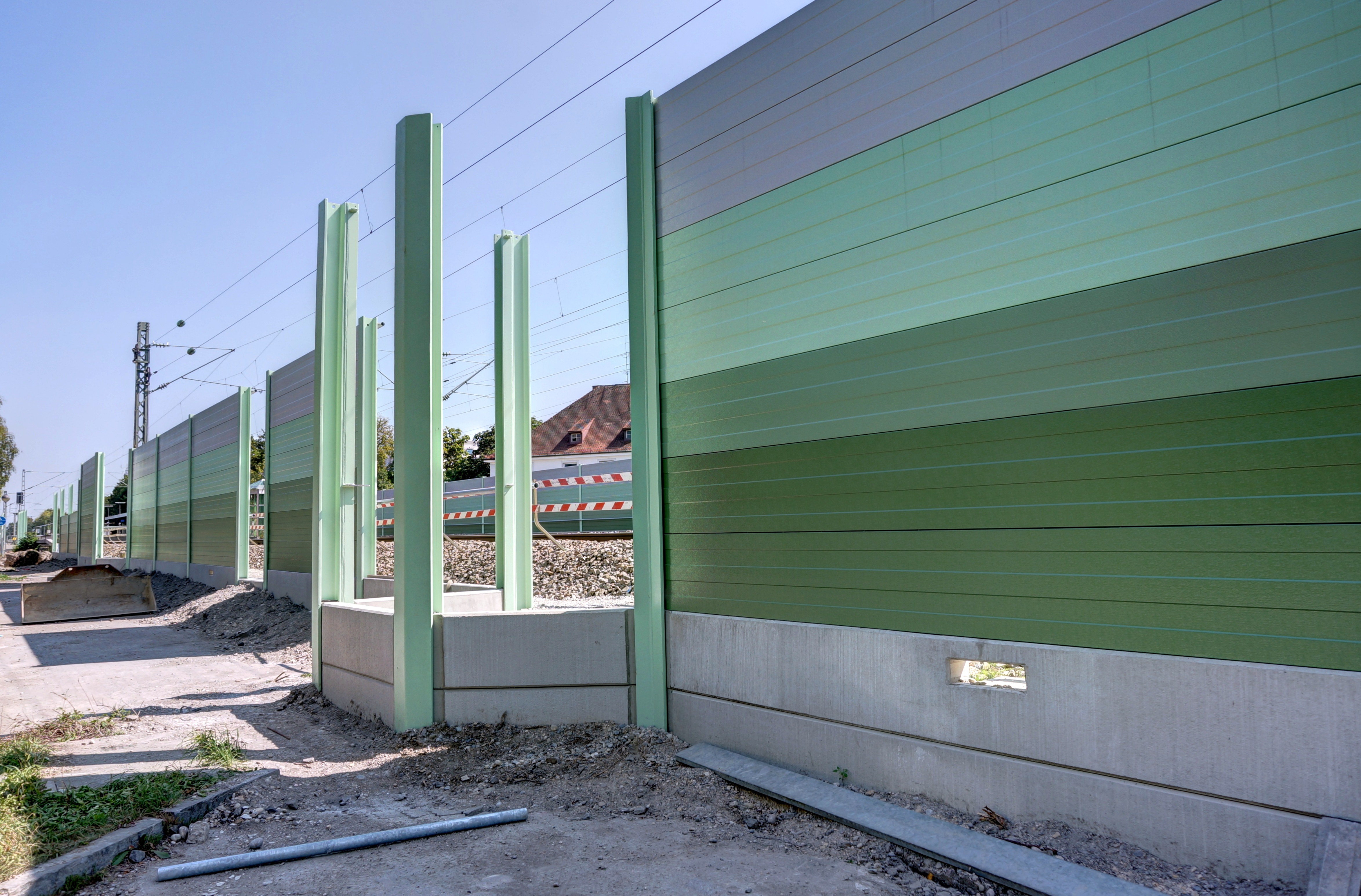 Deutschland, Bayern, Landkreis Fürstenfeldbruck, Gröbenzell, in Bau befindliche Lärmschutzwand an der Hauptstrecke München-Augsburg im Ortszentrum im nördlichen Gleisbereich (Sonnenstraße), Juli 2013